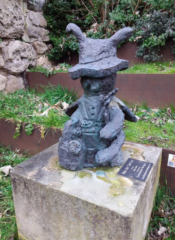 Max der Gärdner